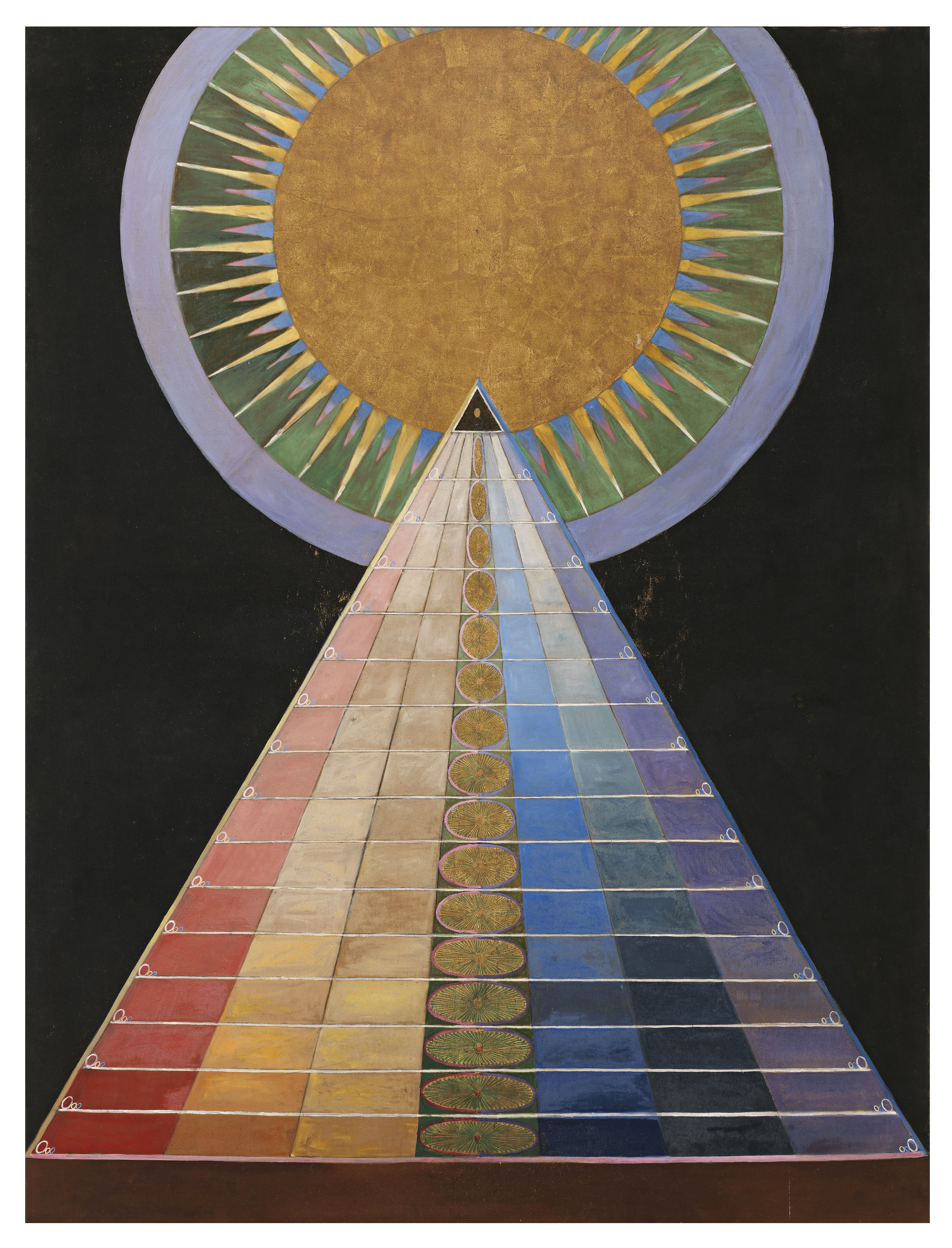 Hilma af Klint, Altarpiece, No. 1, Group X, Altarpieces, 1907 Stiftelsen Hilma af Klints Verk. Photo: Albin Dahlström/ Moderna Museet.